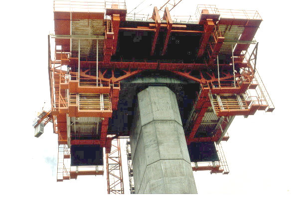 Viaduc de La Barricade - Début de construction en encorbellement du fléau sur la pile P1